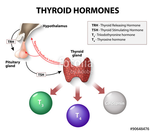 Procés de producción de les hormones tiroïdals